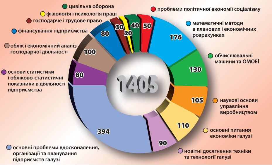 Тематический план факультета организаторов промышленного производства (ФОПП) Харьковского инженерно-экономического института, 1969/1970 учебный год